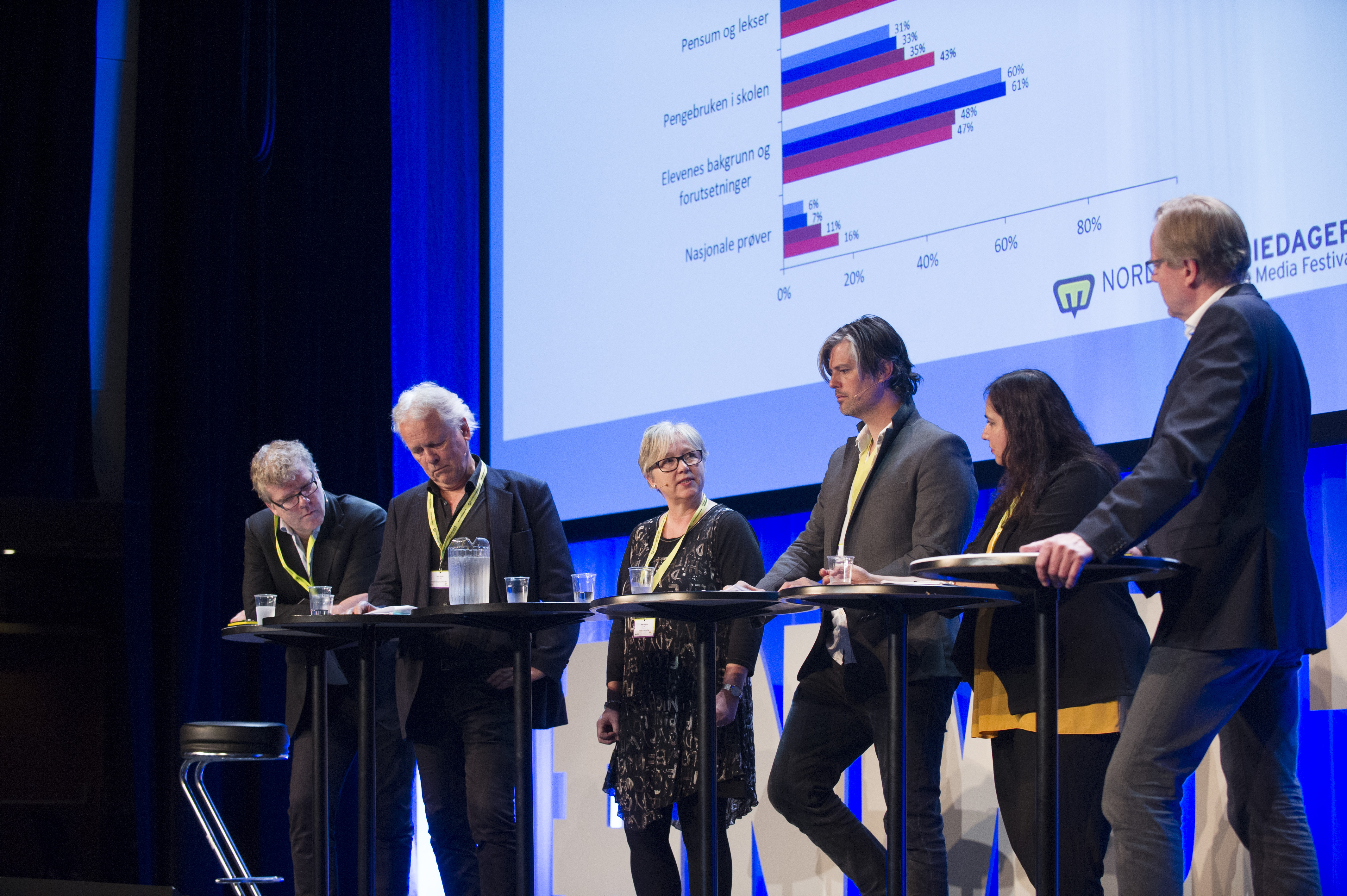 Medvirkende: Jens Garbo, Rita Helgesen, Jon Hustad, Shazia Sarwar, Håvard Tjora, Frank Aarebrot.Moderator: Arill Riise.